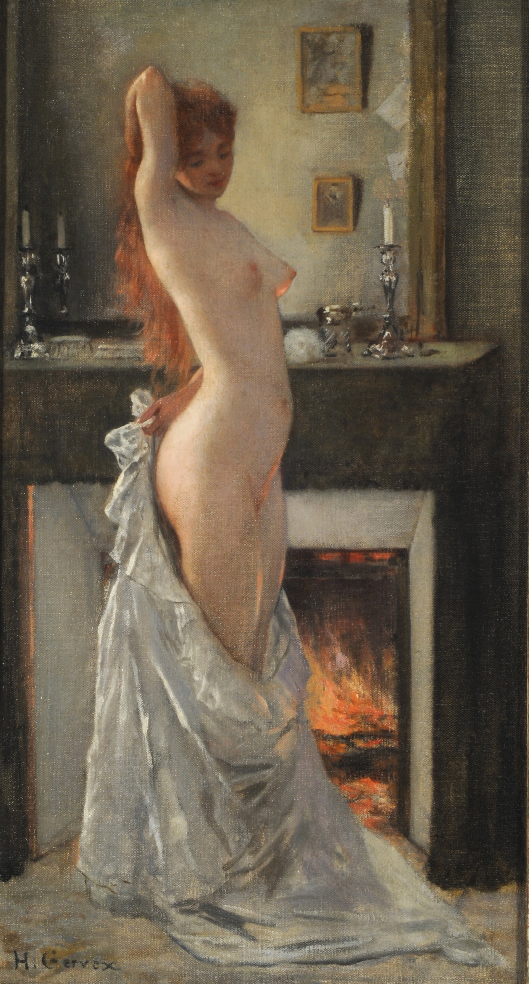 Henri Gervex, Parisina en su toilette. Siglo XIX. 65 x 35,5 cm, óleo sobre tela. Inv. 2057.